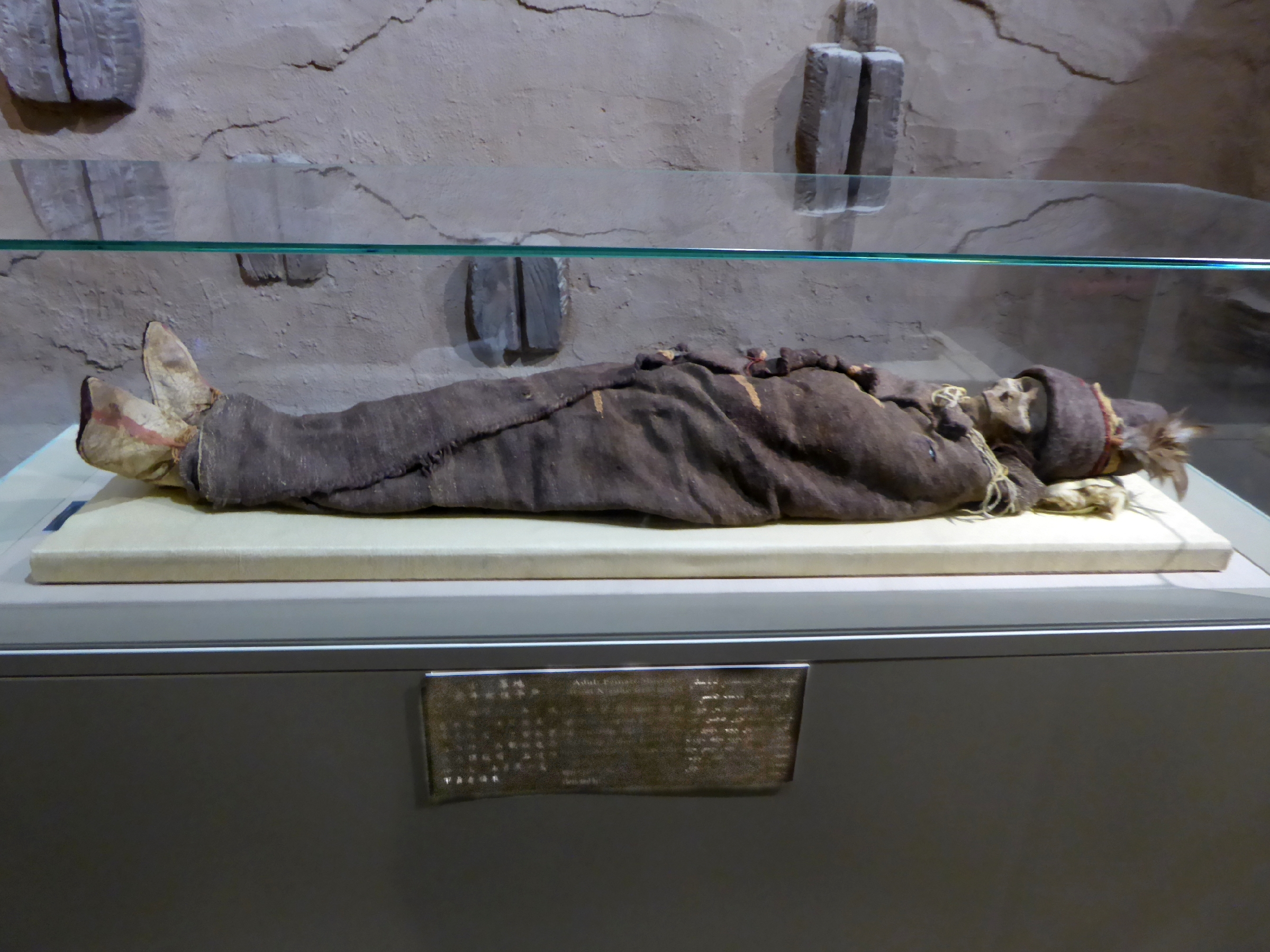 Xinjiang Uygur Autonomous Region Museum Urumqi Xinjiang China 新疆 乌鲁木齐 新疆维吾尔自治区博物馆